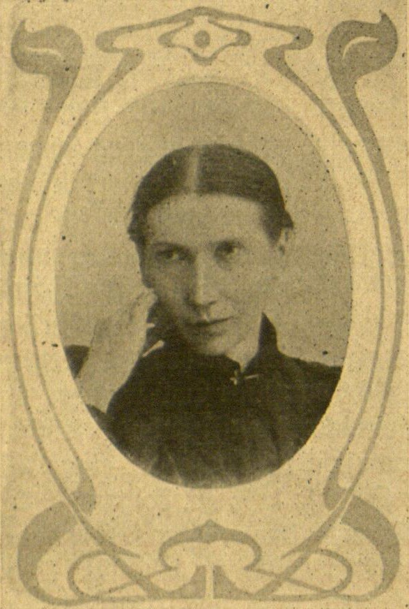 Porträt der deutschen Schriftstellerin Johanna Ambrosius